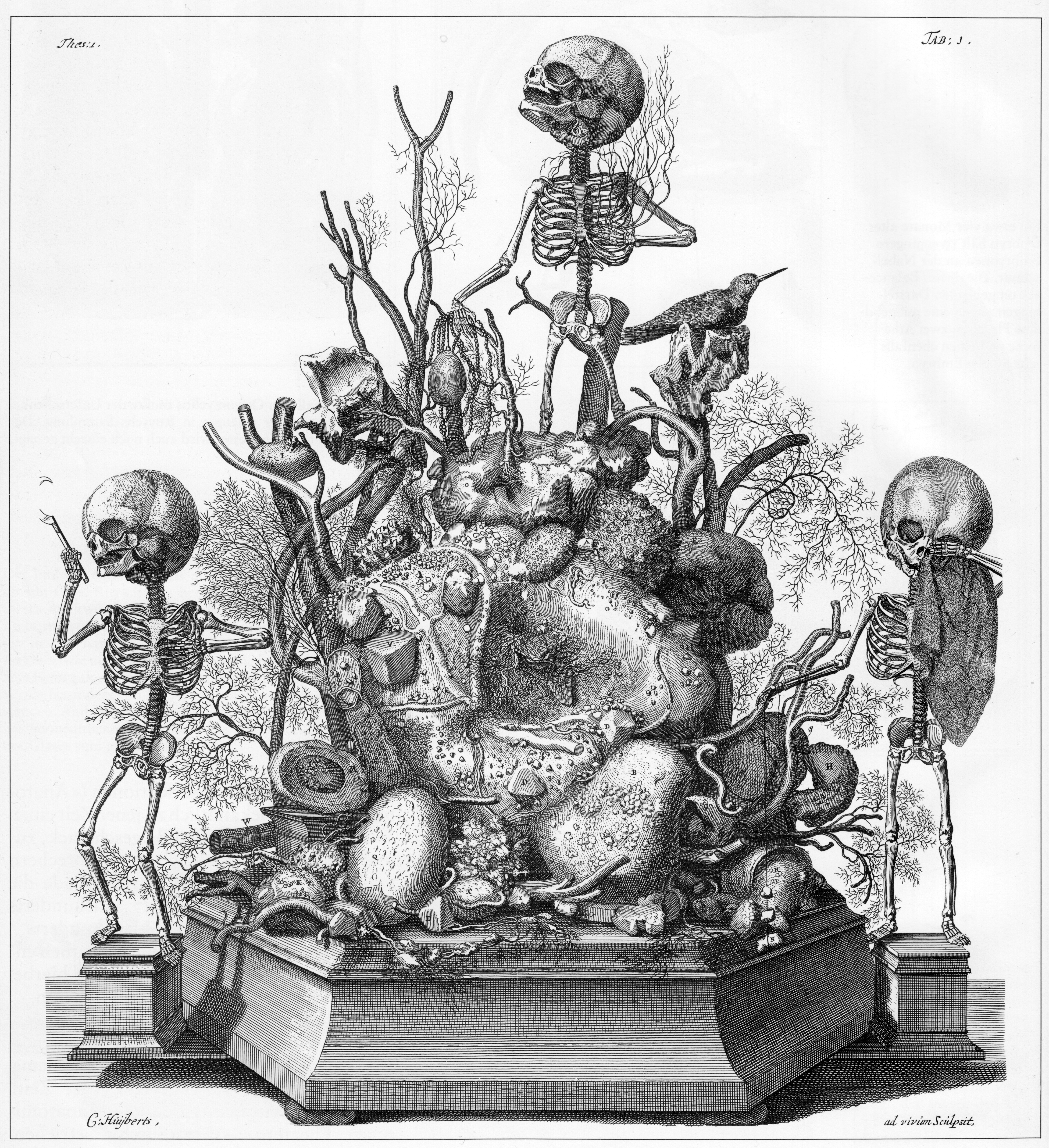 Memento mori - Tafel im Anatomiebuch des F. Ruysch